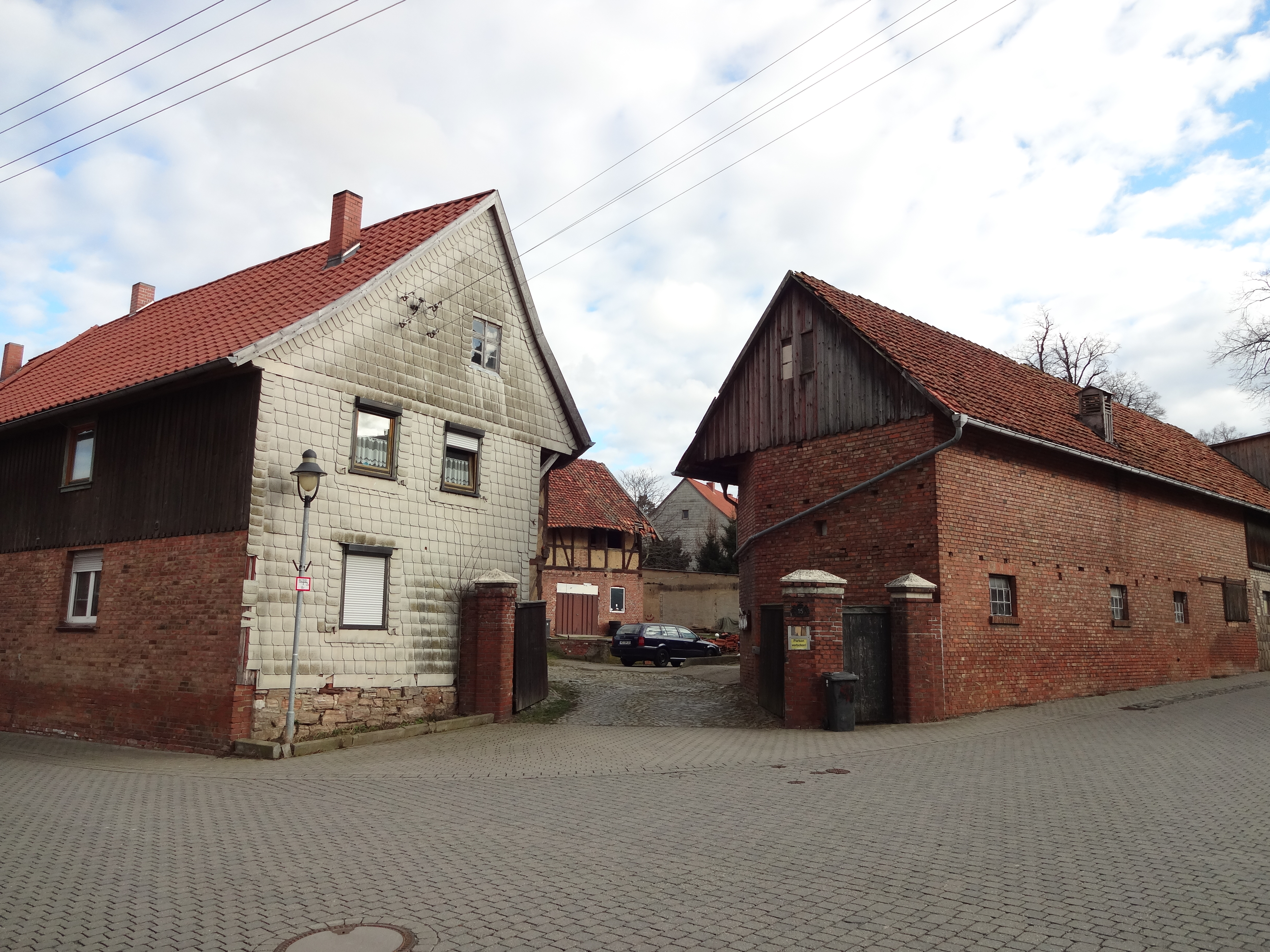 Denkmalgeschütztes Bauernhaus in der Glockengasse 15 in Silstedt, Ortsteil von Wernigerode